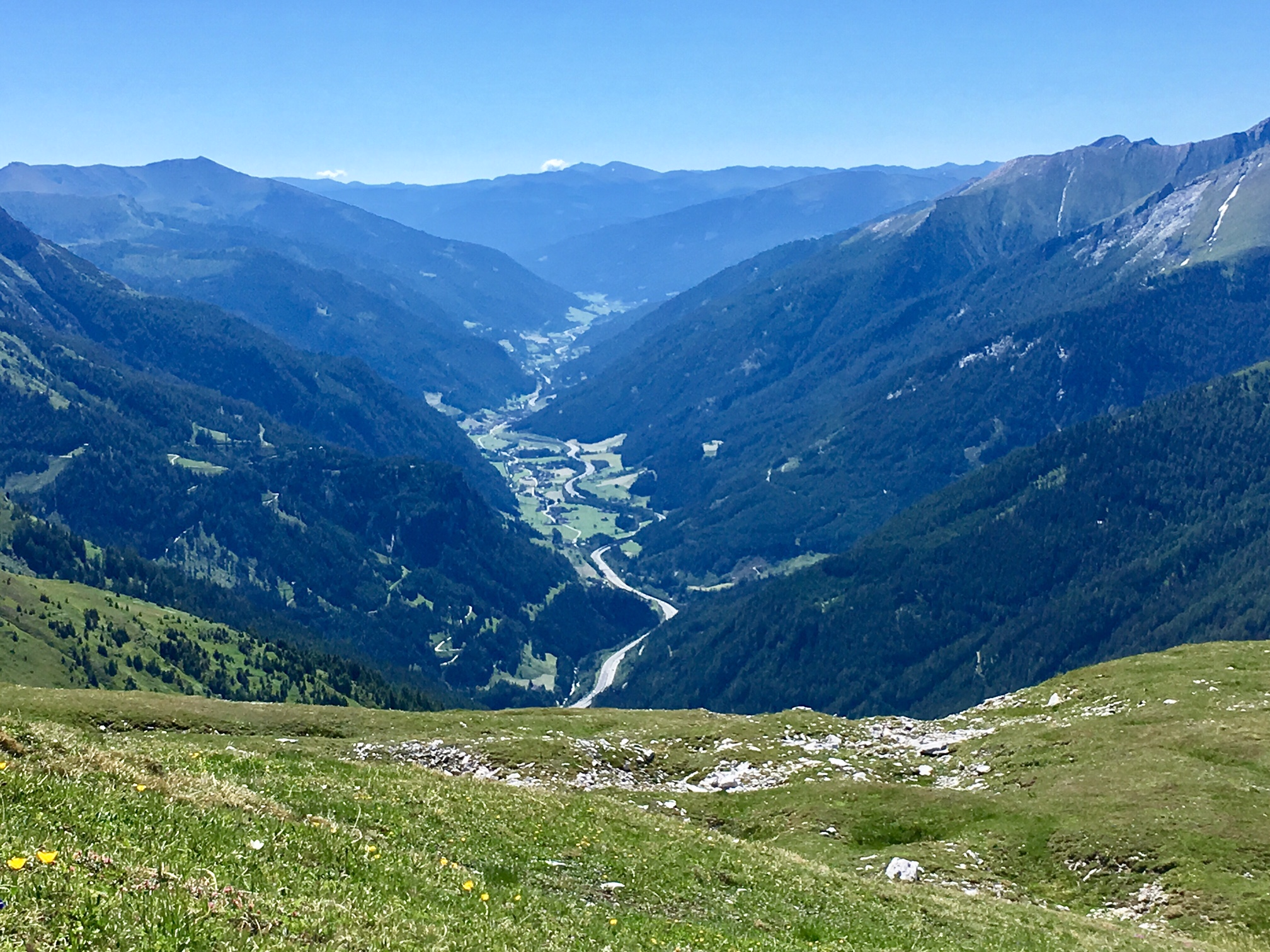 Riedingtal in Zederhaus This file shows the Nature Park with the ID 5837 in Austria.